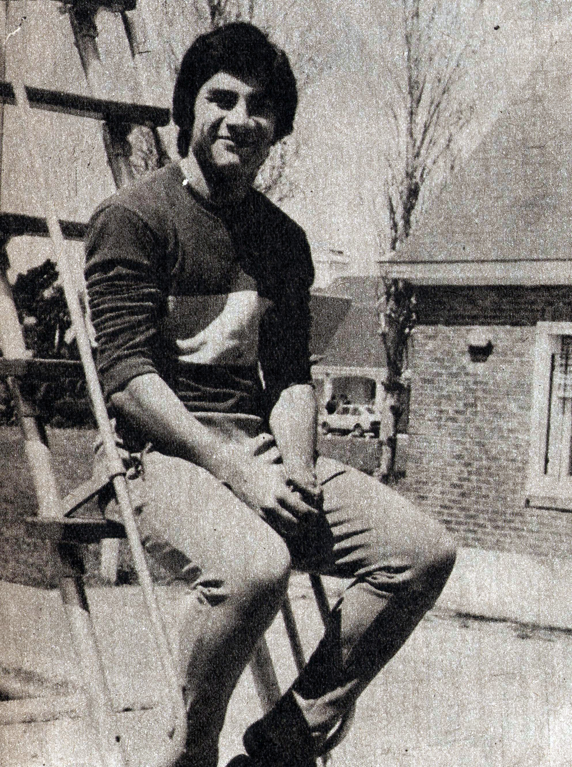 El futbolista Hugo Perotti en 1977.